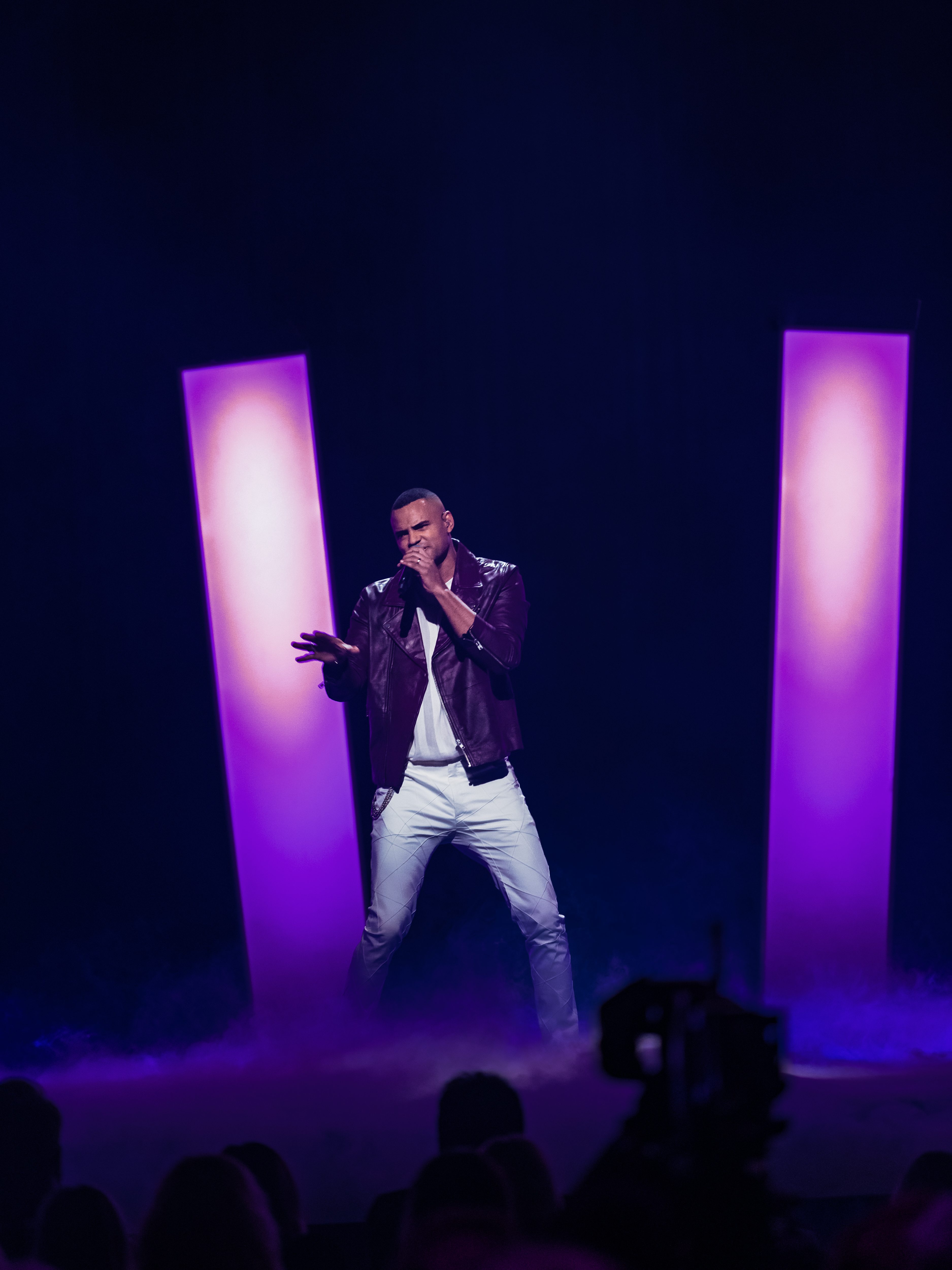 Mohombi framför sitt bidrag "Winners" på scenen under finalen i Melodifestivalen 2020 på Friends Arena